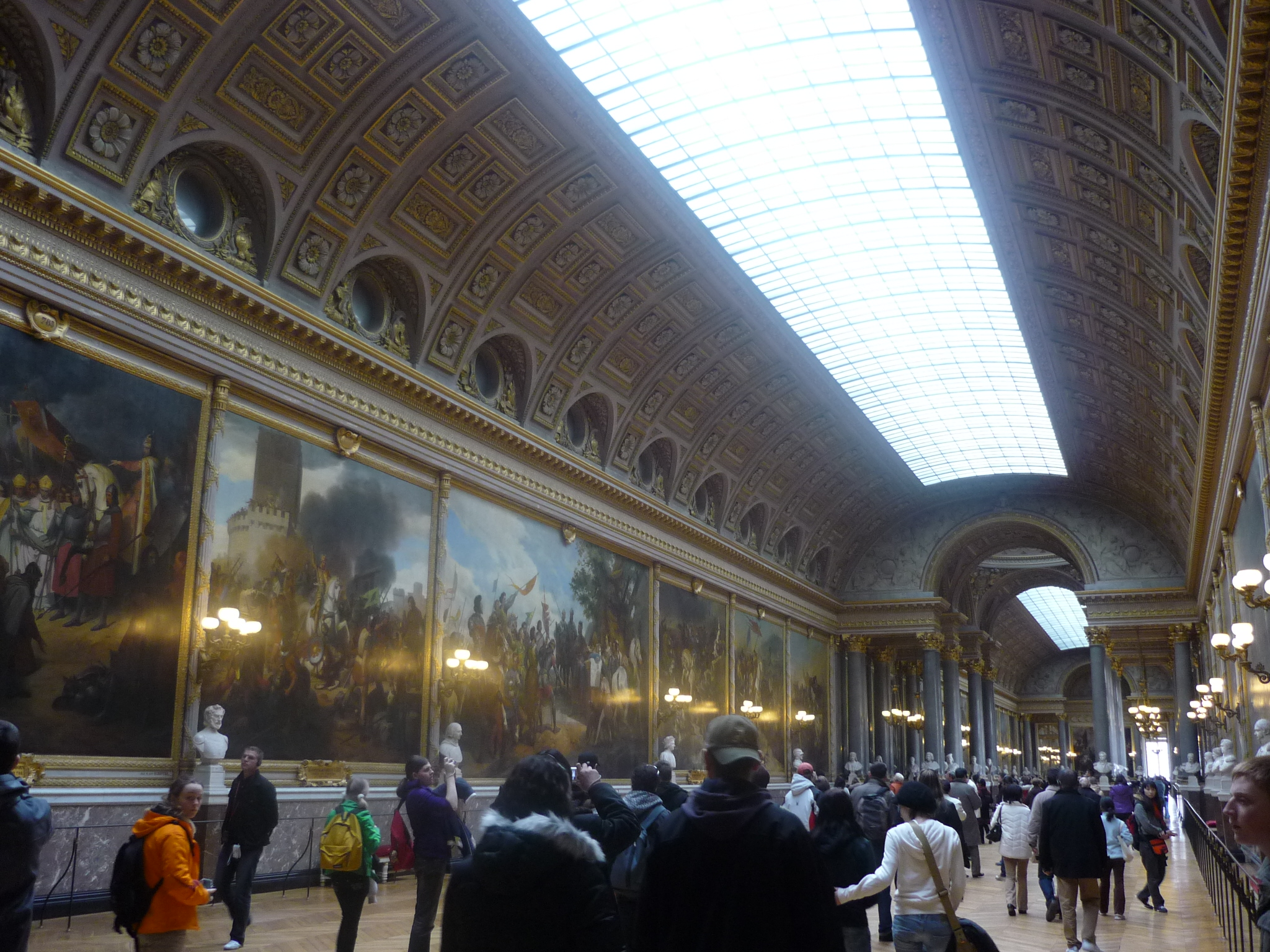 Schlachtengalerie, Musée national du Château de Versailles, Schloss Versailles, Frankreich.